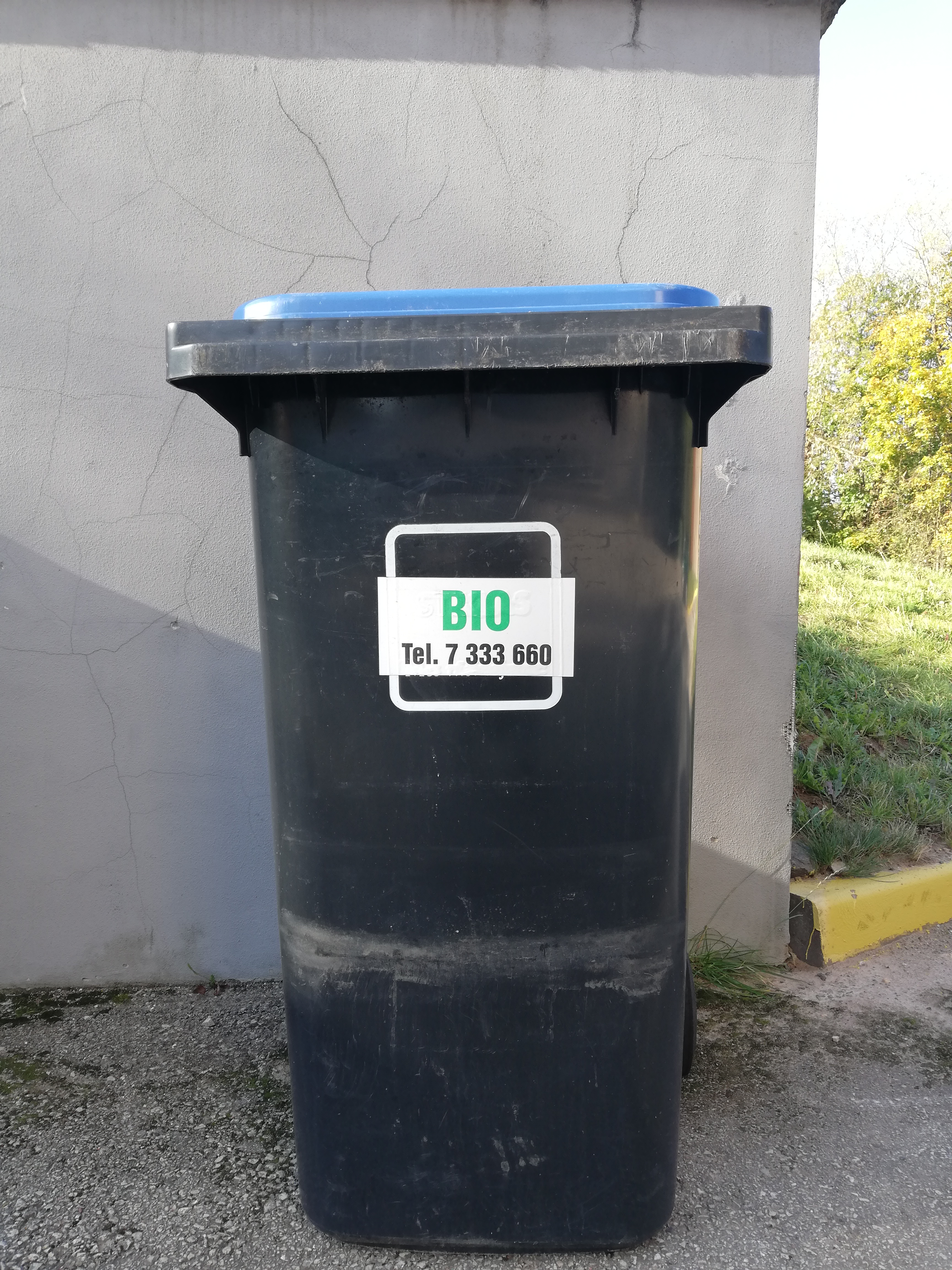 Biolagunevate jäätmete kogumiseks on ette nähtud vastava tähistusega konteinerid.